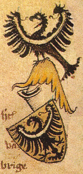 Herb Ludwika I księcia brzeskiego w Armorial Gelre